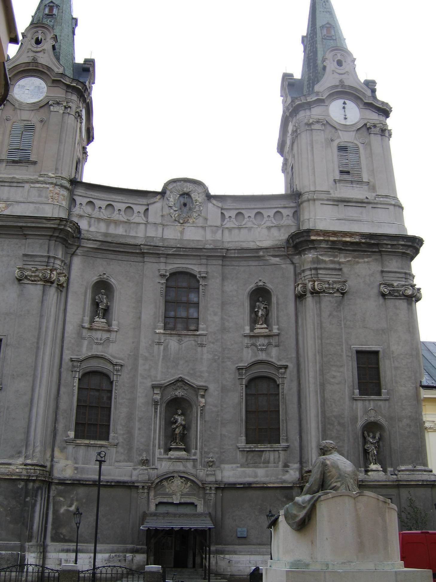 Komárno, Slovakia, St. Andreas-Kirche, 18. Jh.